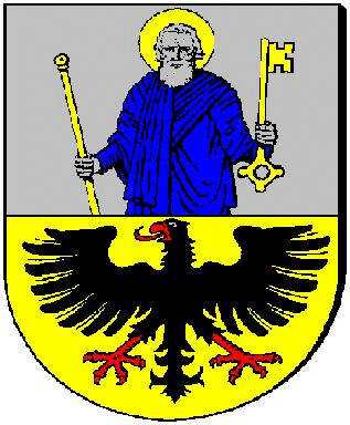 Wappen von Weinolsheim Weinolsheim